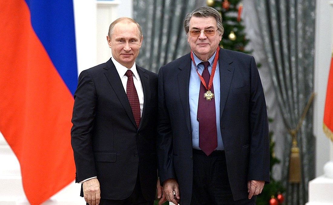 Церемония вручения государственных наград Российской Федерации. Награждение Александра Ширвиндта ОРДЕНОМ «ЗА ЗАСЛУГИ ПЕРЕД ОТЕЧЕСТВОМ» III СТЕПЕНИ. 22 декабря 2014 года